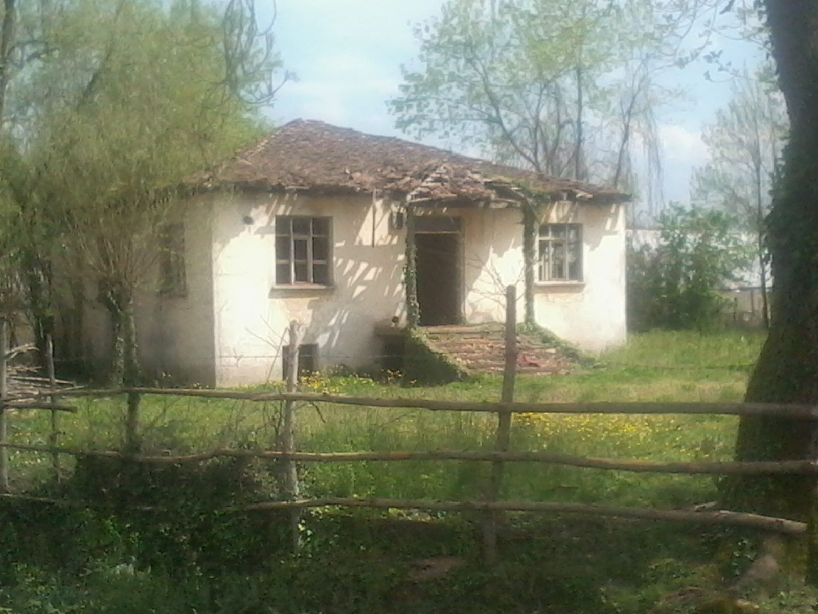 eski ev